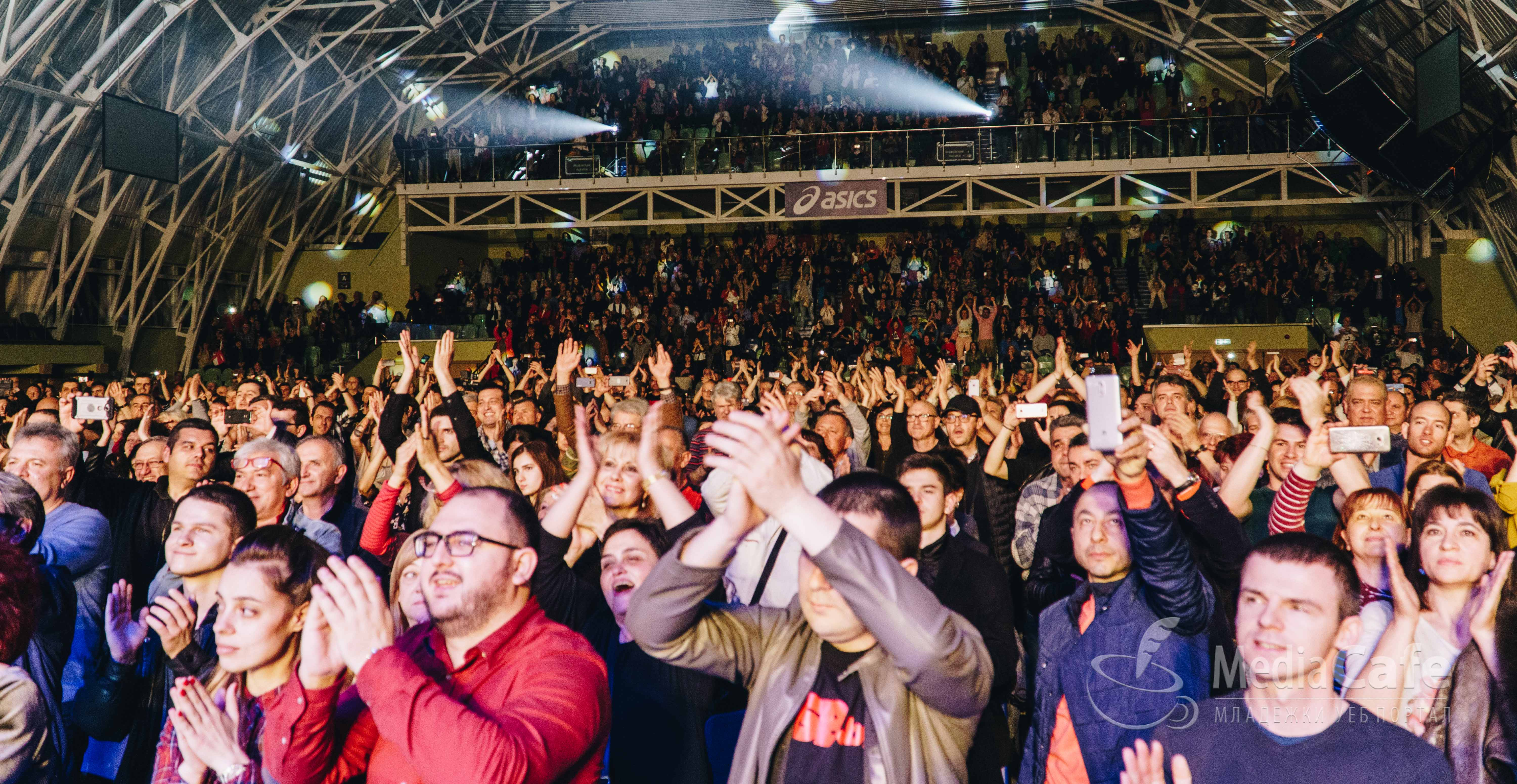 Публика в залата на Комплекс С.И.²Л.А.